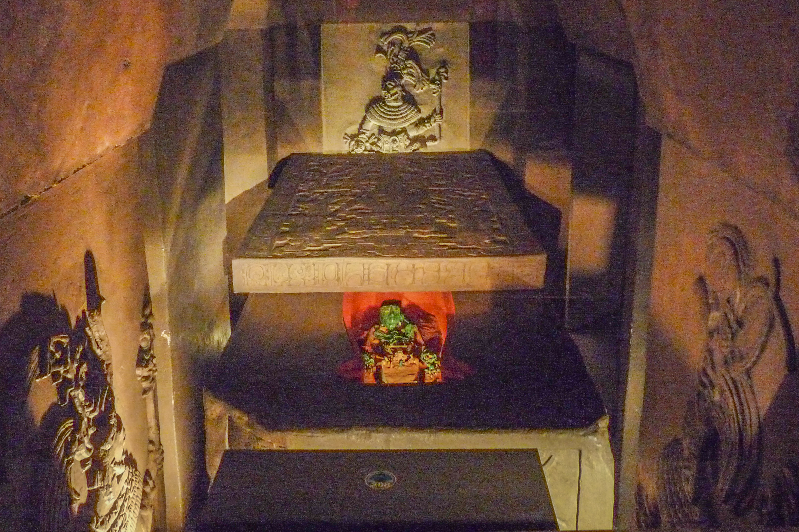 Reproducción del mausoleo de Pakal el Grande (Museo Nacional de Antropología).